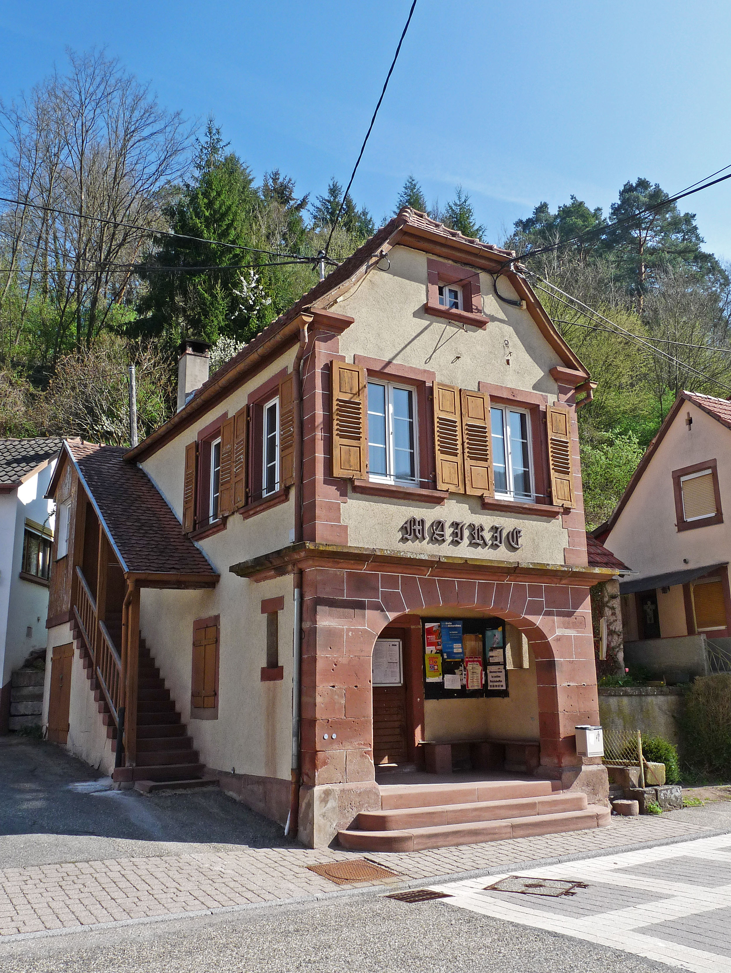 Mairie de Niedersteinbach (Bas-Rhin).